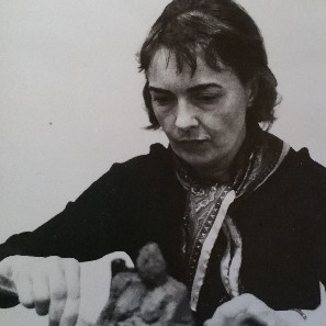 Nora i arbete